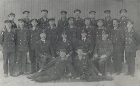 Buttlar-Brandenfels succesfulde mandskab